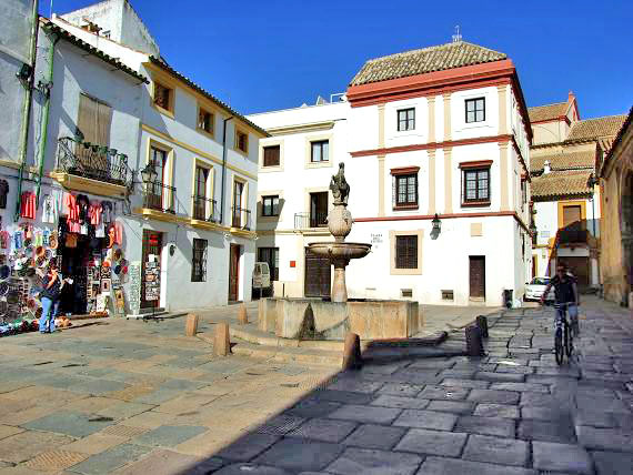 Plaza del Potro, Córdoba (España)